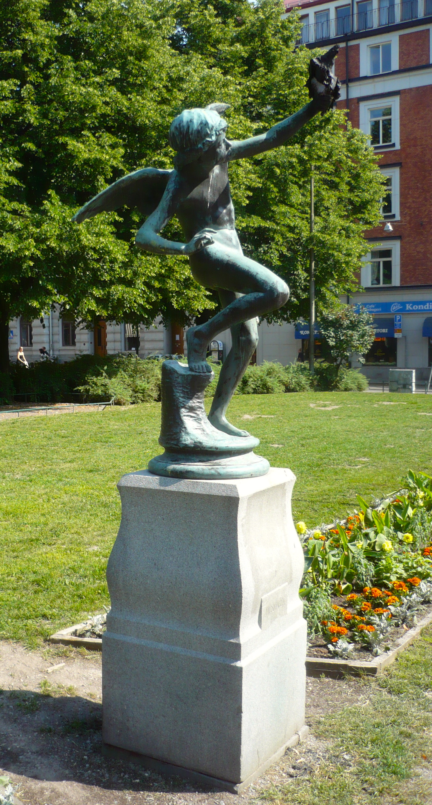 Tjusningen (franska: Le Charme) är en skulptur av en stående pojke ursprungligen utförd i gips av Per Hasselberg 1880. Statyn på Mariatorget är gjuten i brons 1917 på Meyers konstgjuteri i Stockholm.